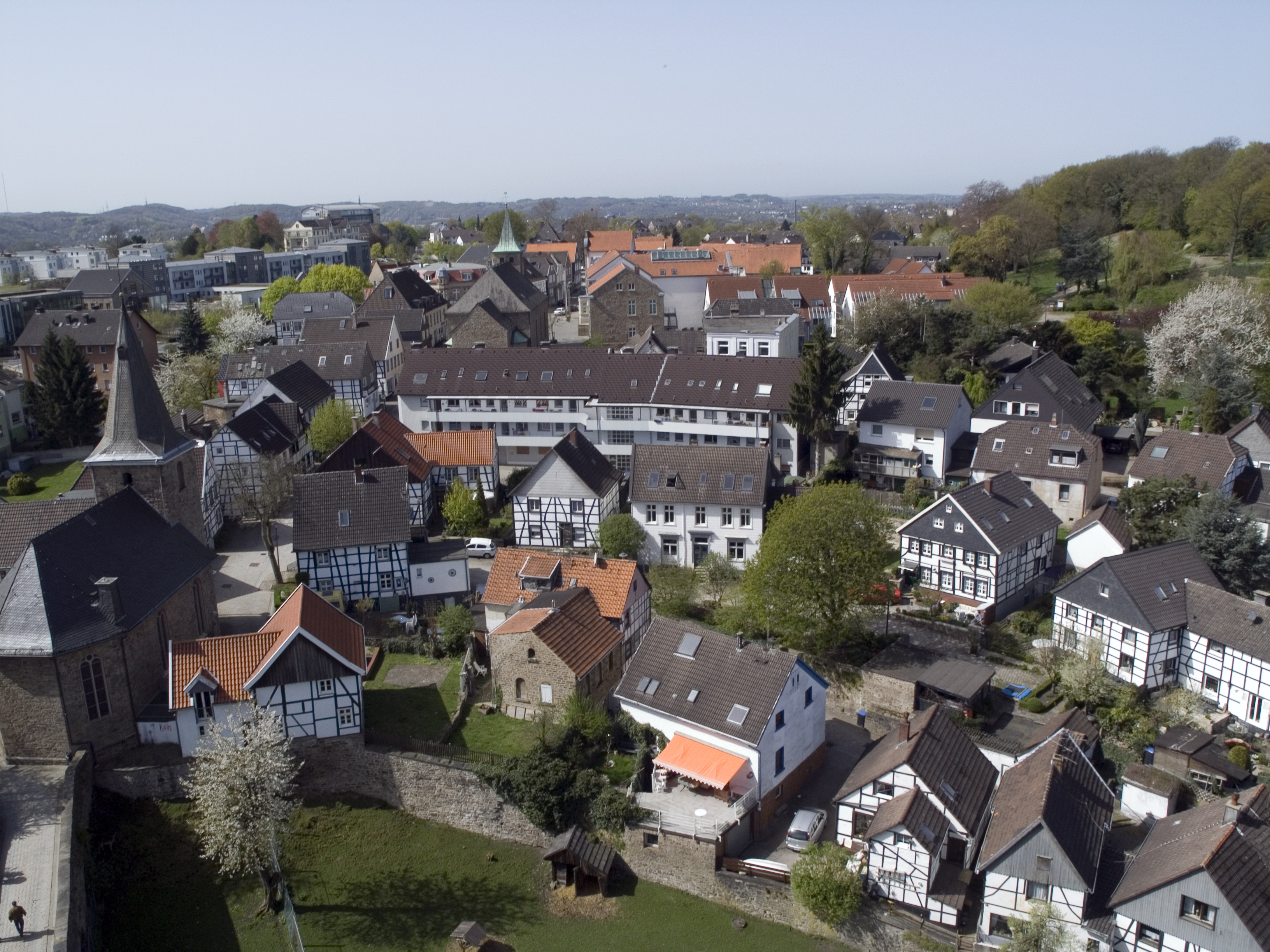 Северный Рейн - Вестфалия, Хаттинген. Замок Бланкенштайн, вид на Фрайхайт